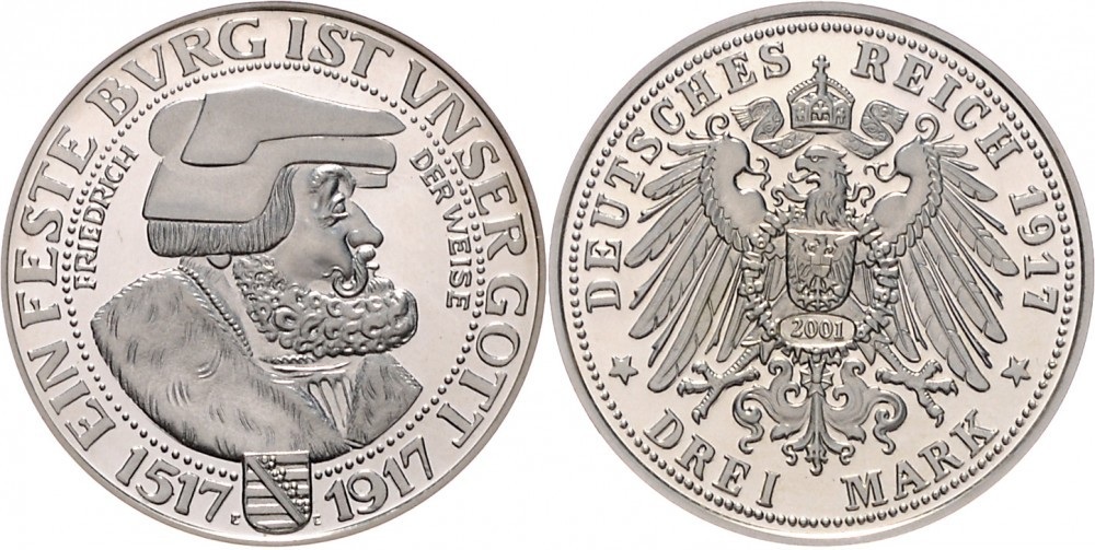 Sachsen, Friedrich der Weise, Nachprägung 2001